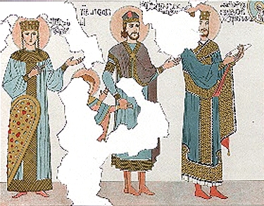 Georgie. Vie, deteils et peintures de l'eglise de Sion.